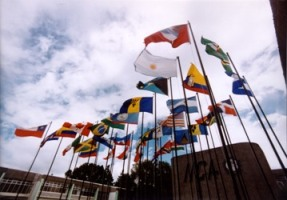 pertenece a IICA